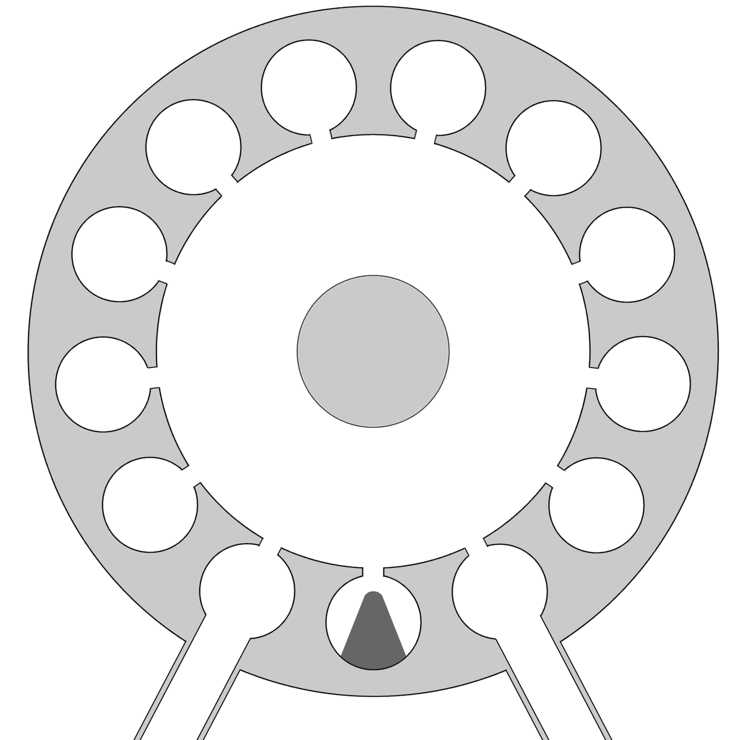 prinzipieller Aufbau eines Kreuzfeldverstärkers (Amplitron)